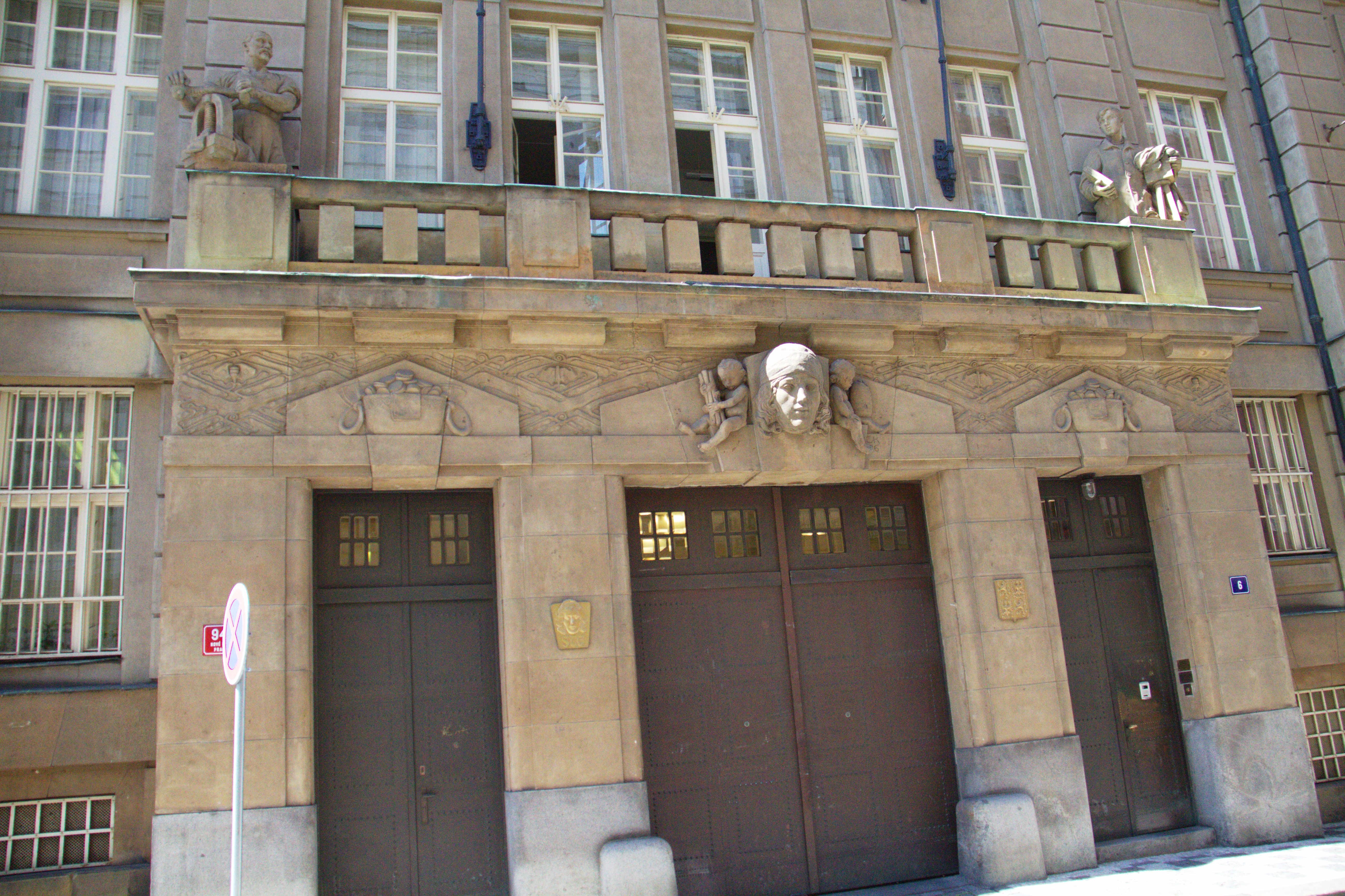 Praha-Nové Město, Růžová 943/6, Státní tiskárna cenin.